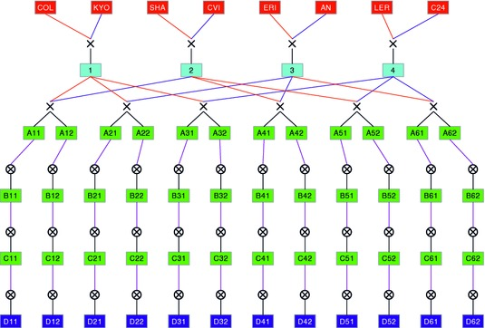 Skema persilangan dialel